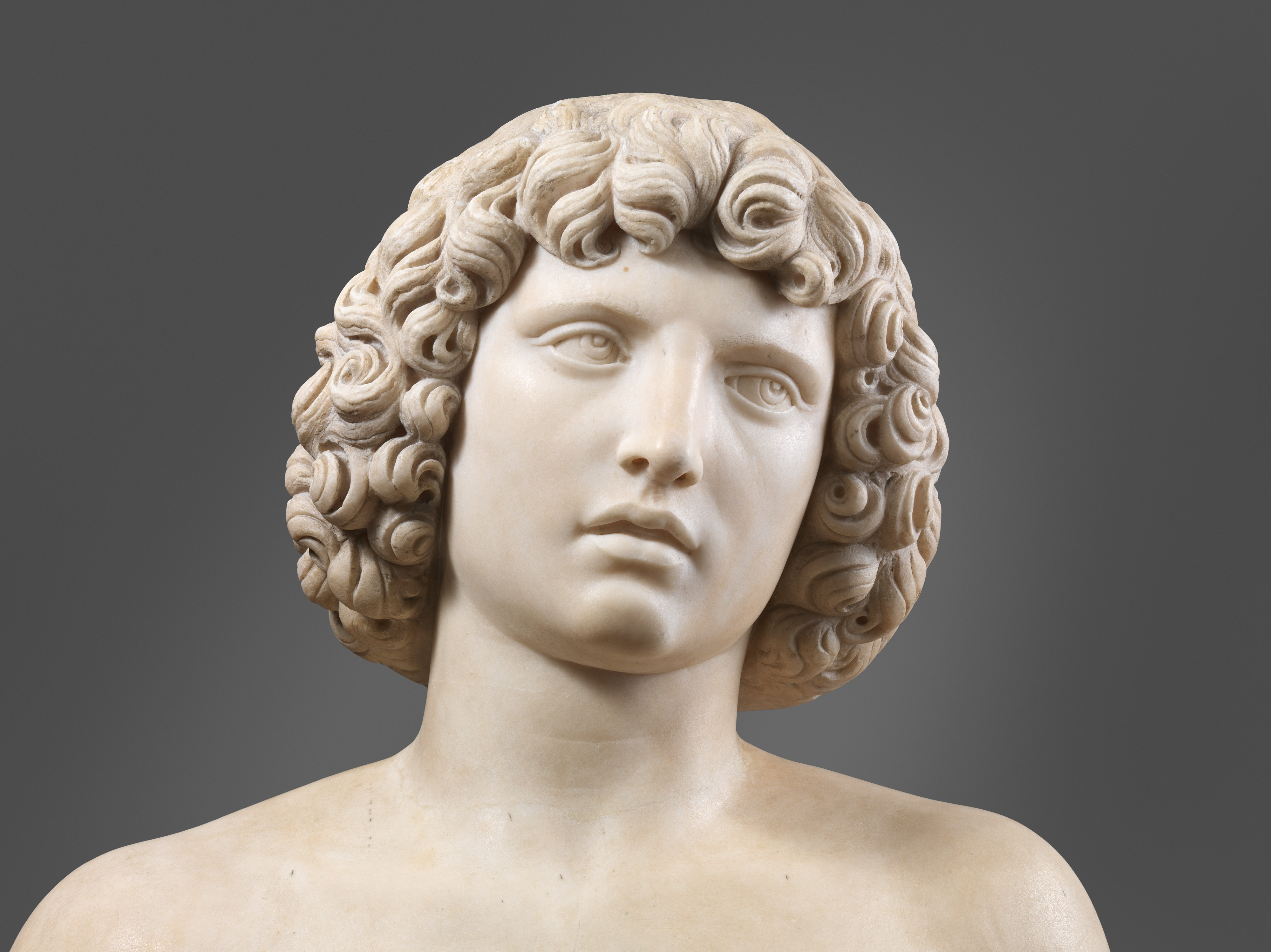 Italian, Venice; Statue; Sculpture